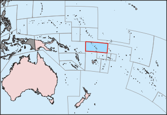 Karte Ozeaniens, Tuvalu hervorgehoben, selbst erstellt